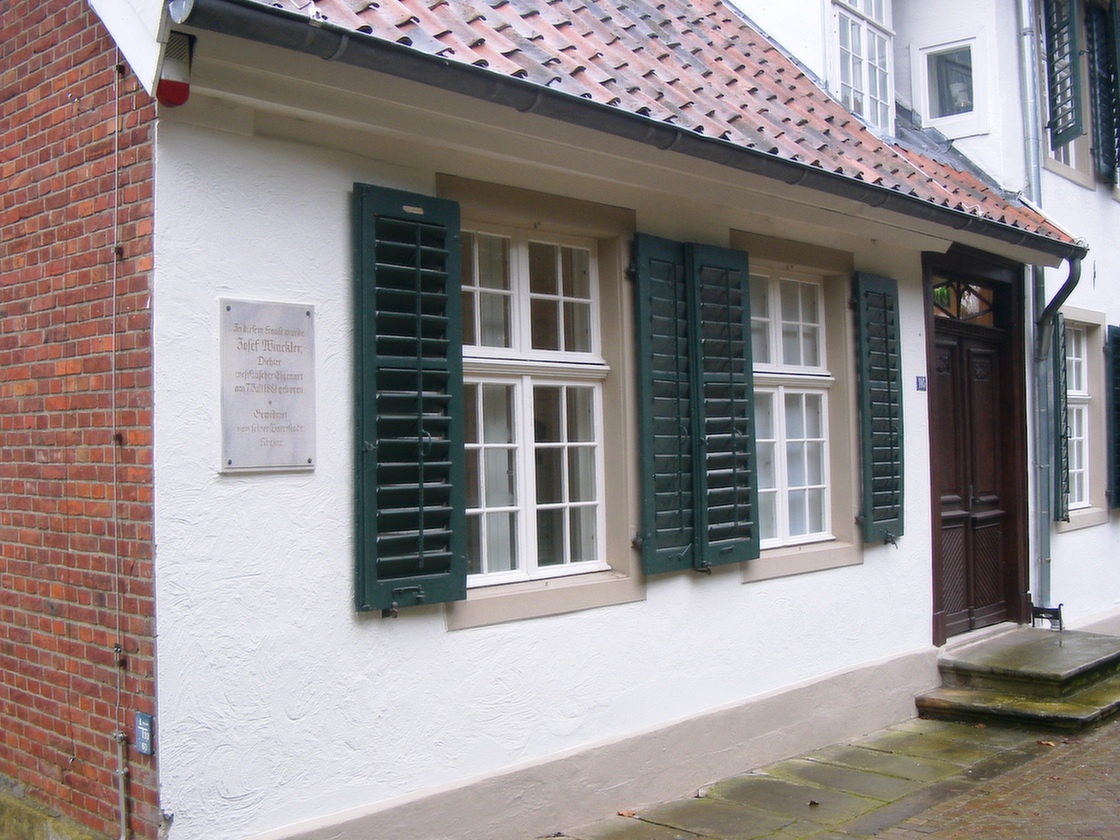 Verwalterhaus der Saline Gottesgabe in Rheine-Bentlage, Geburtshaus von Josef Winckler, Westflügel des Salzsiedehauses